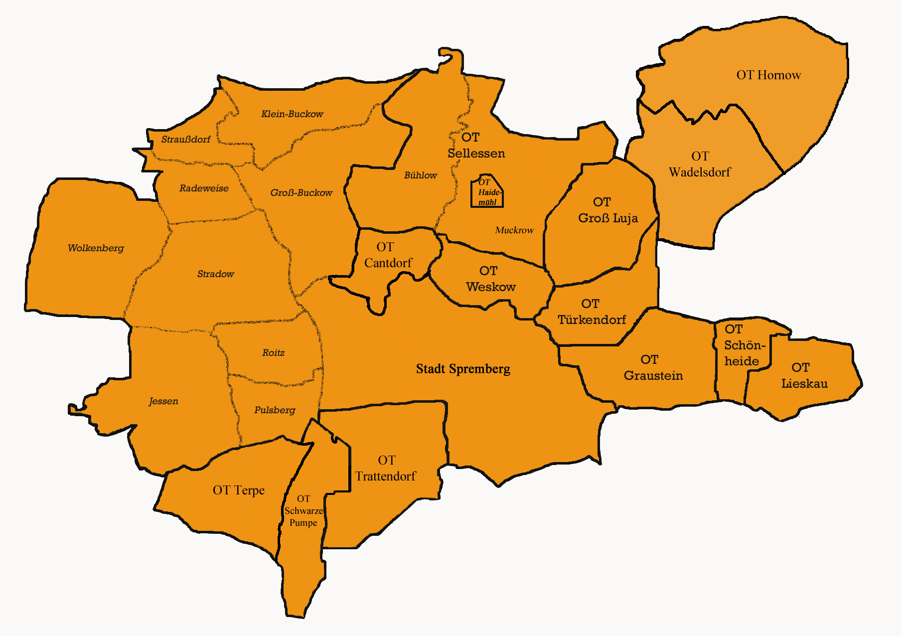 Stadtgebiet Spremberg und seine Ortsteile